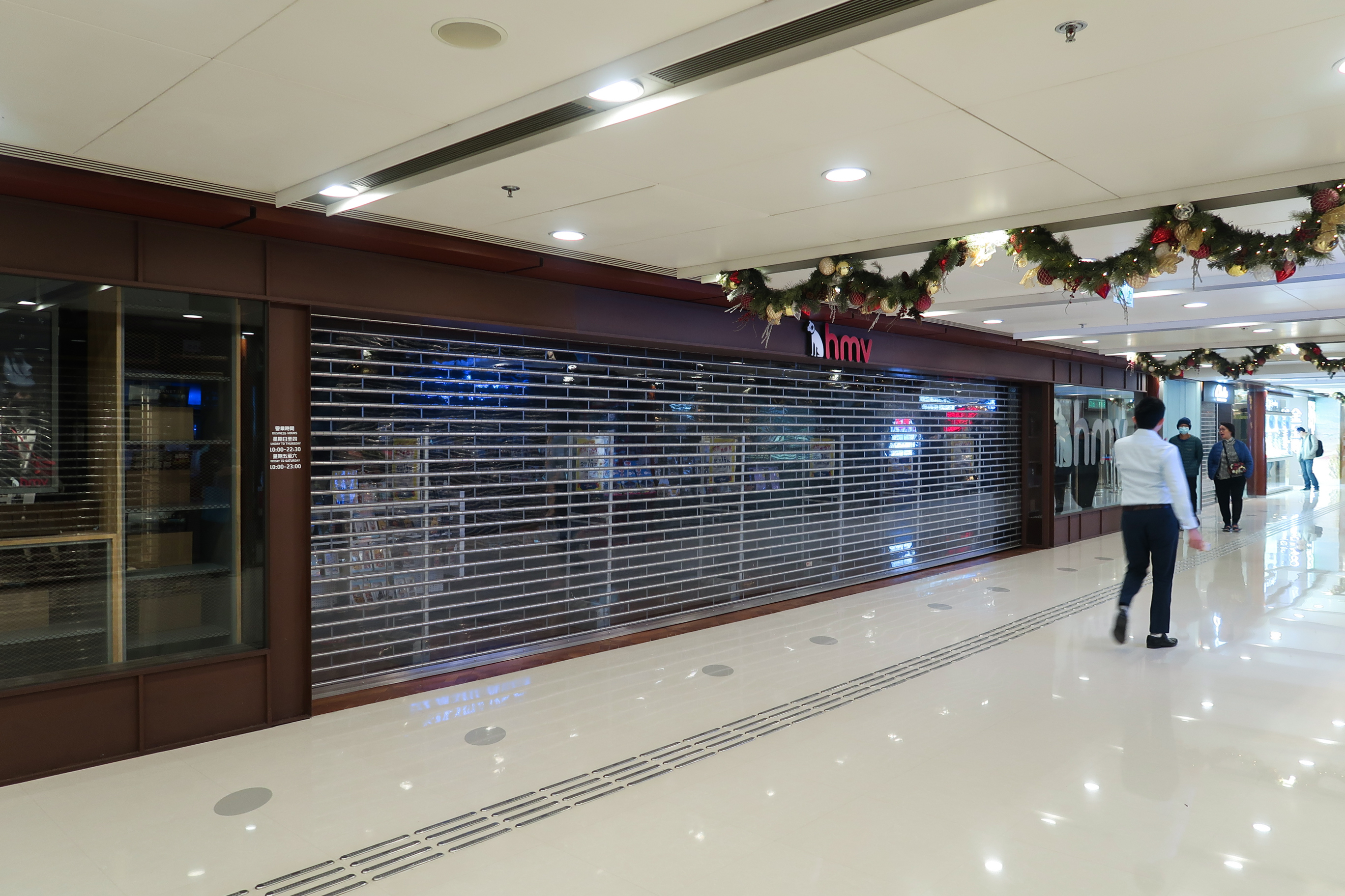 Hmv Telford Plaza Store closure